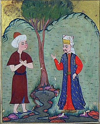 Âşık Çelebi’nin Meşâirü’ş-şuarâ adlı tezkiresinde Taşlıcalı Yahyâ’nın tasvir edildiği sayfa (Millet Ktp., Ali Emîrî Efendi, Tarih, nr. 772, vr. 240a)